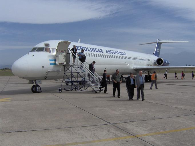 MD-83 de Austral/Aerolíneas Argentinas en el Aeropuerto de San Salvador de Jujuy MD-83 de Austral/Aerolíneas Argentinas en el Aeropuerto de Jujuy (JUJ/SASJ).